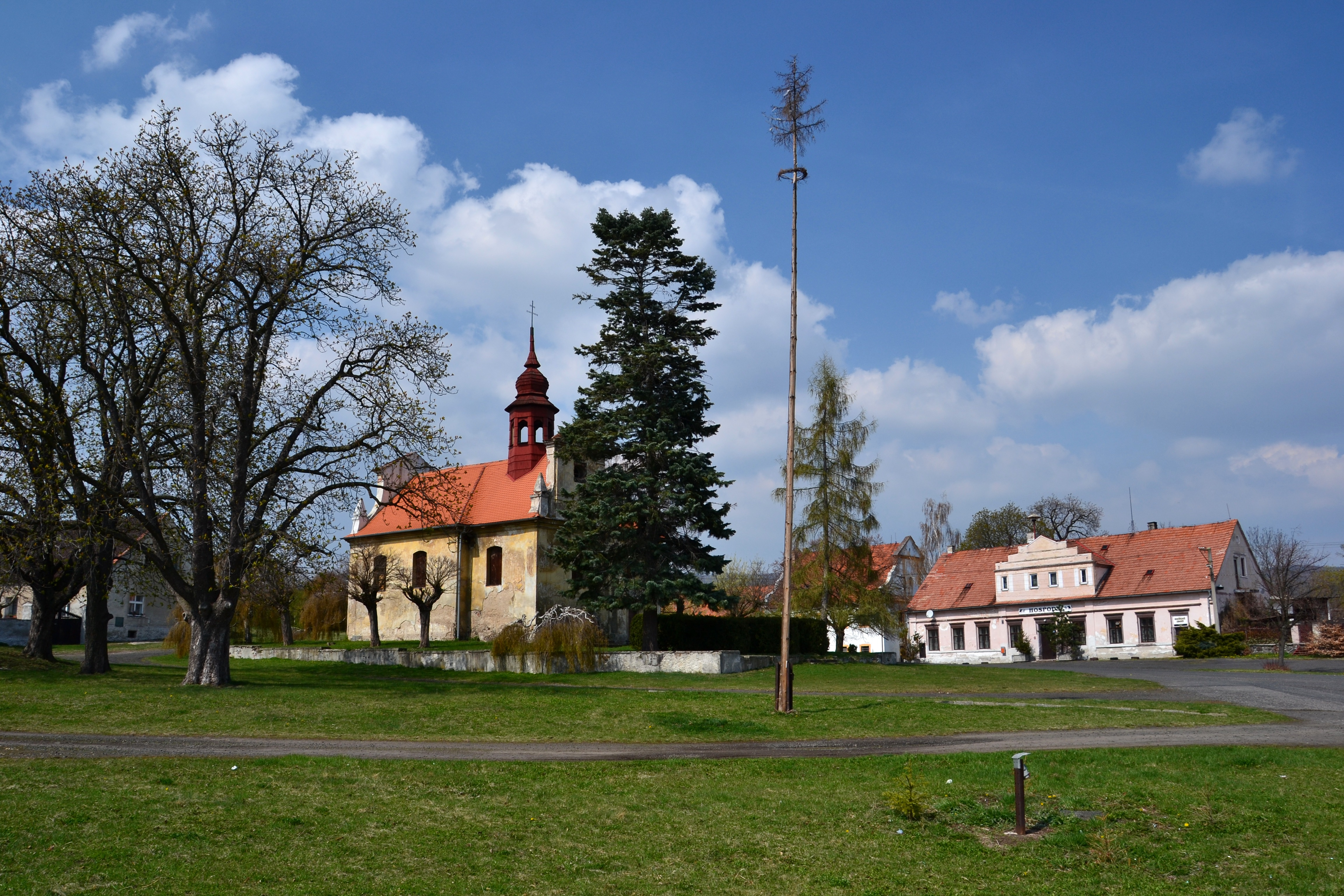 Vintířov - náves s kostelem svaté Markéty